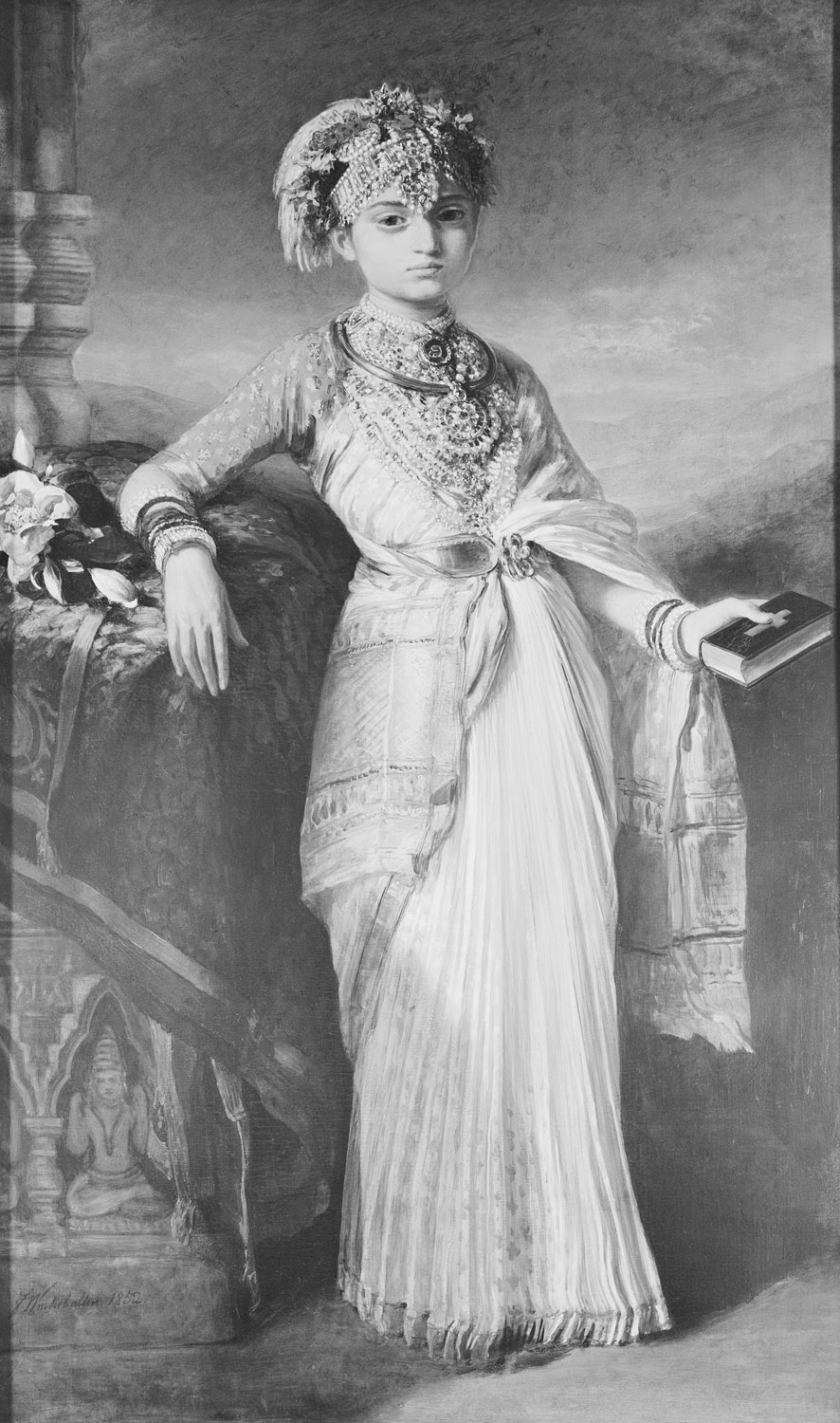 Victoria Gouramma (d 1864)